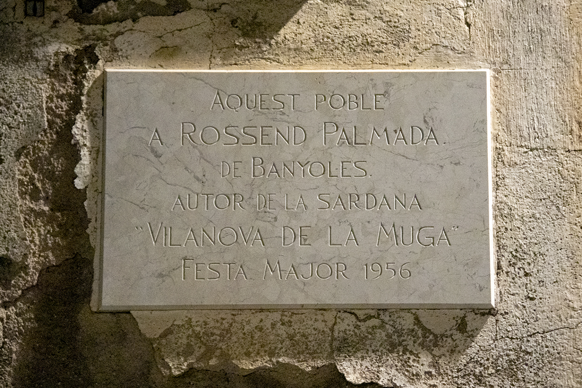 Placa dedica a Rossend Palmada a la vila de Vilanova de la Muga amb motiu de la composició de la sardana "Vilanova de la Muga" del compositor